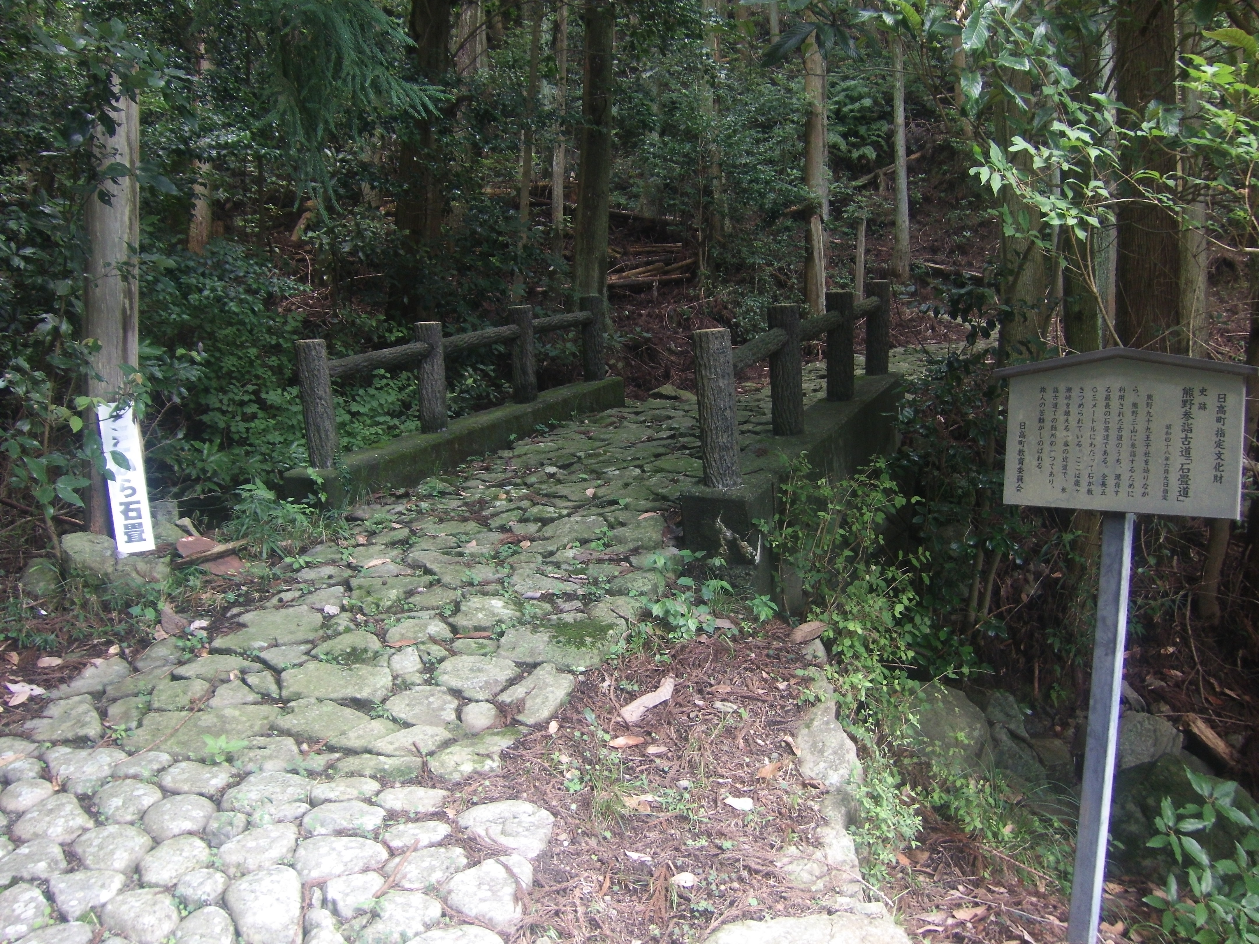 熊野古道・紀伊路の石畳、日高町側から鹿ケ瀬峠へ向かって続く